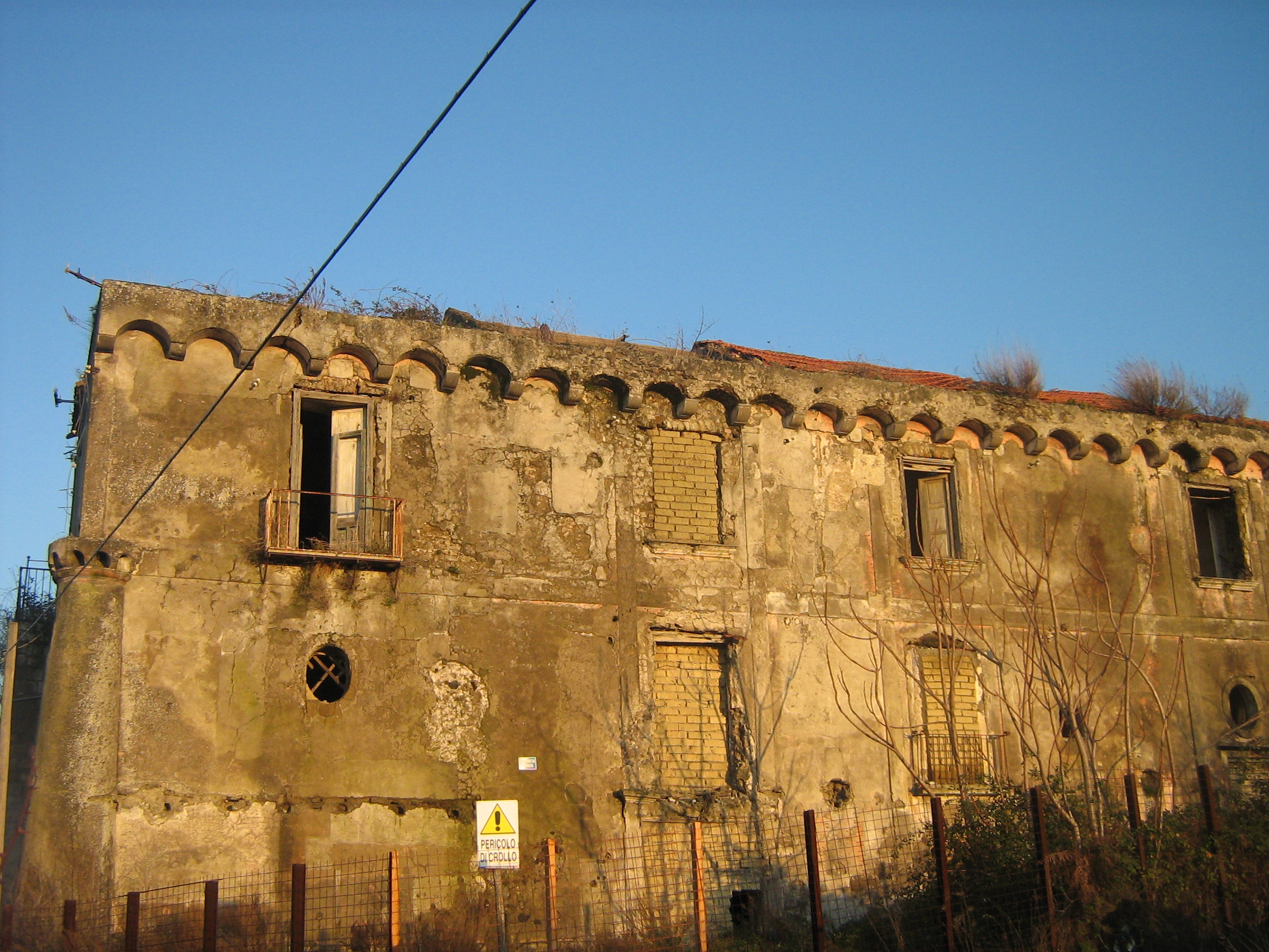 autore:Lusb 11-01-2009